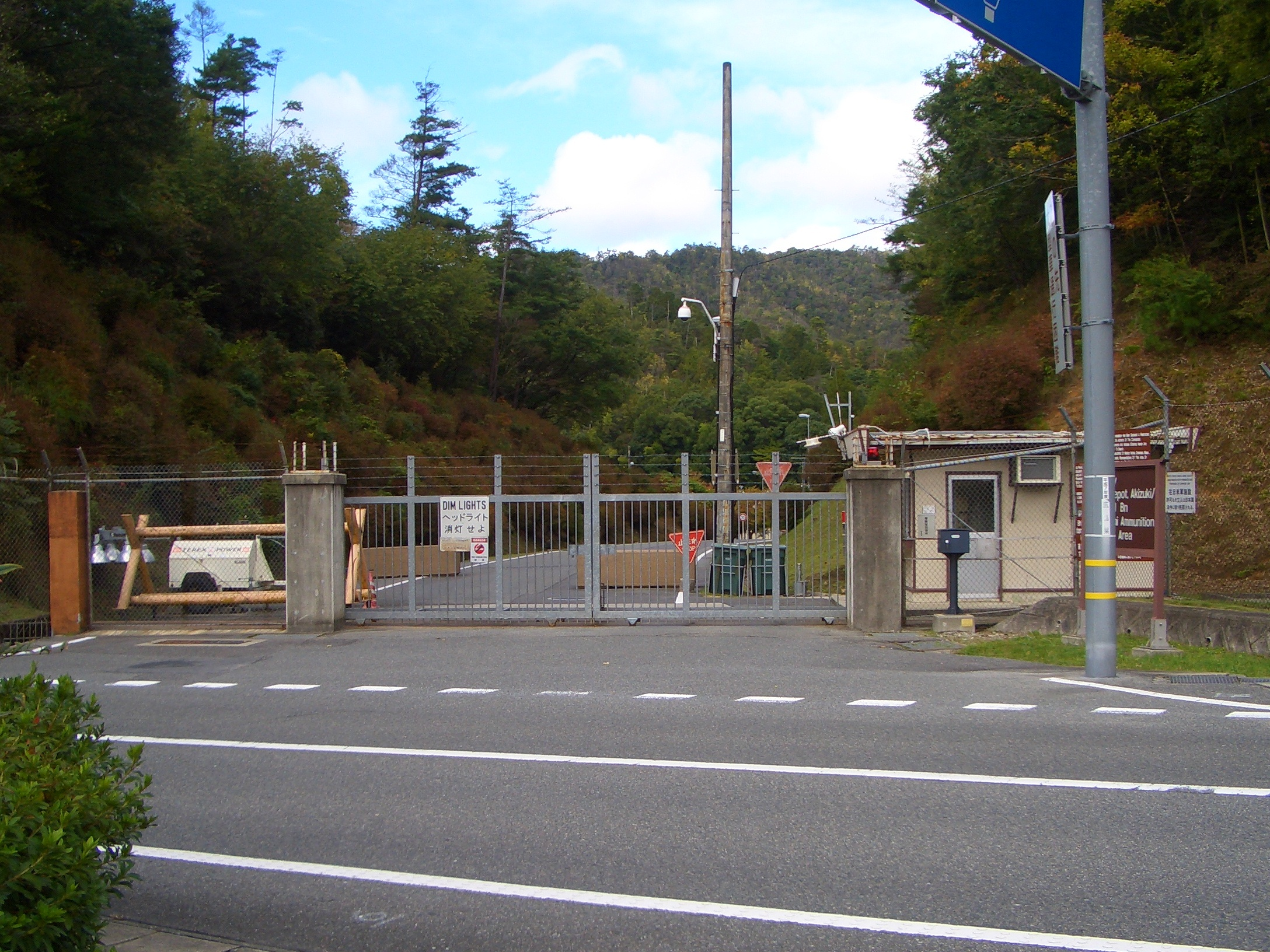 米軍川上弾薬庫の写真